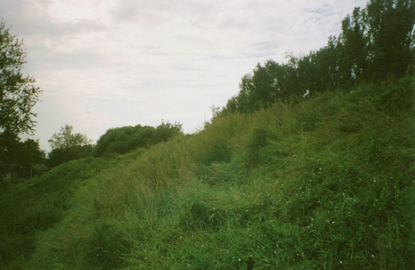 Валы Переславского кремля в Переславле-Залесского